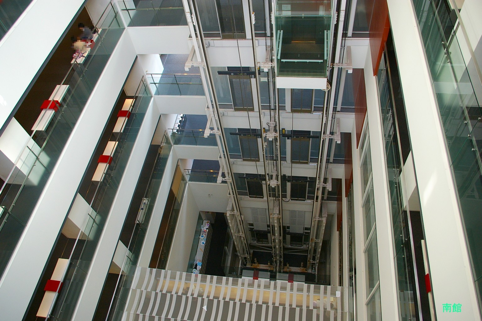 2009.5日本国内で塾生 (talk)が撮影。